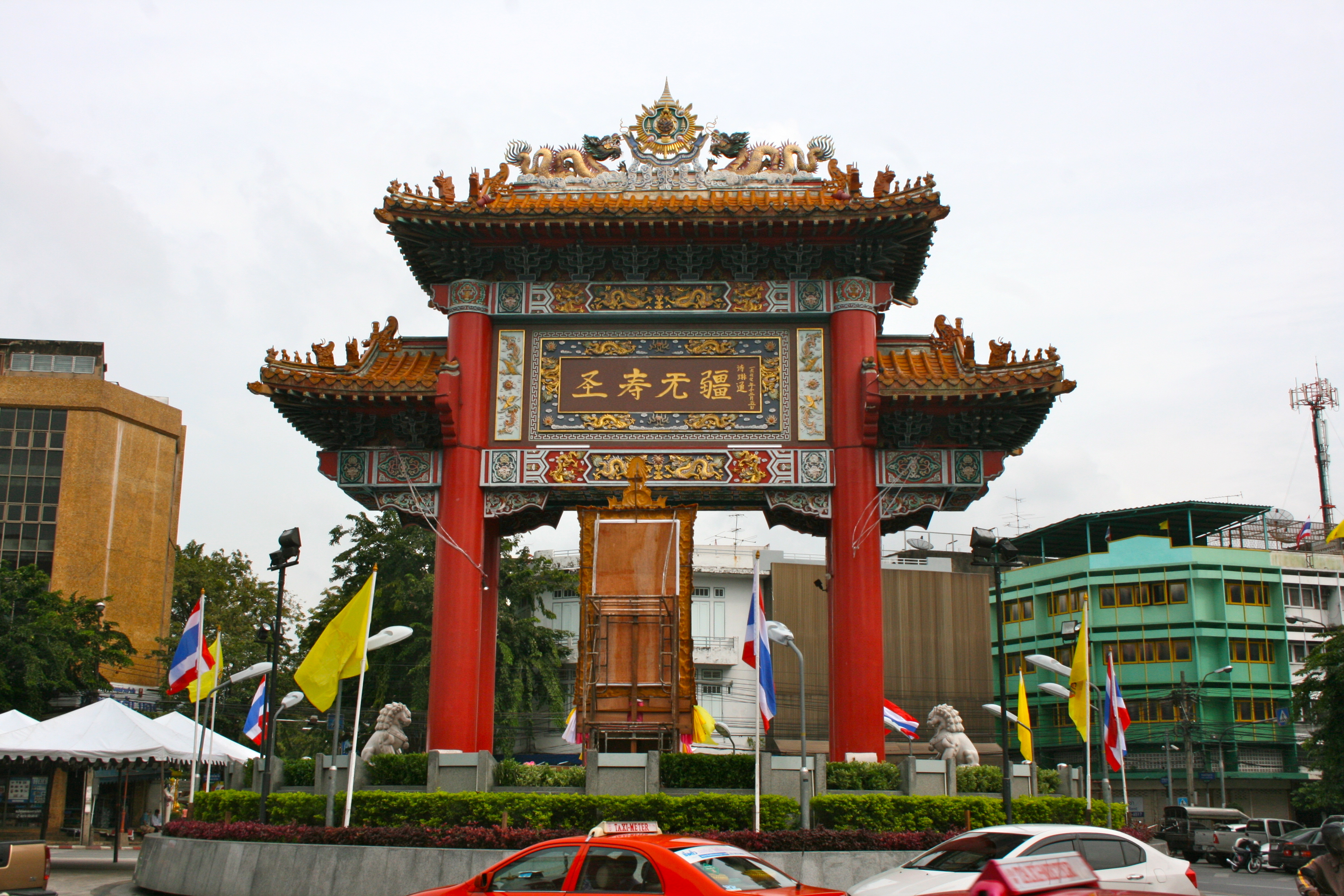 Cuinese Monument, Bangkok